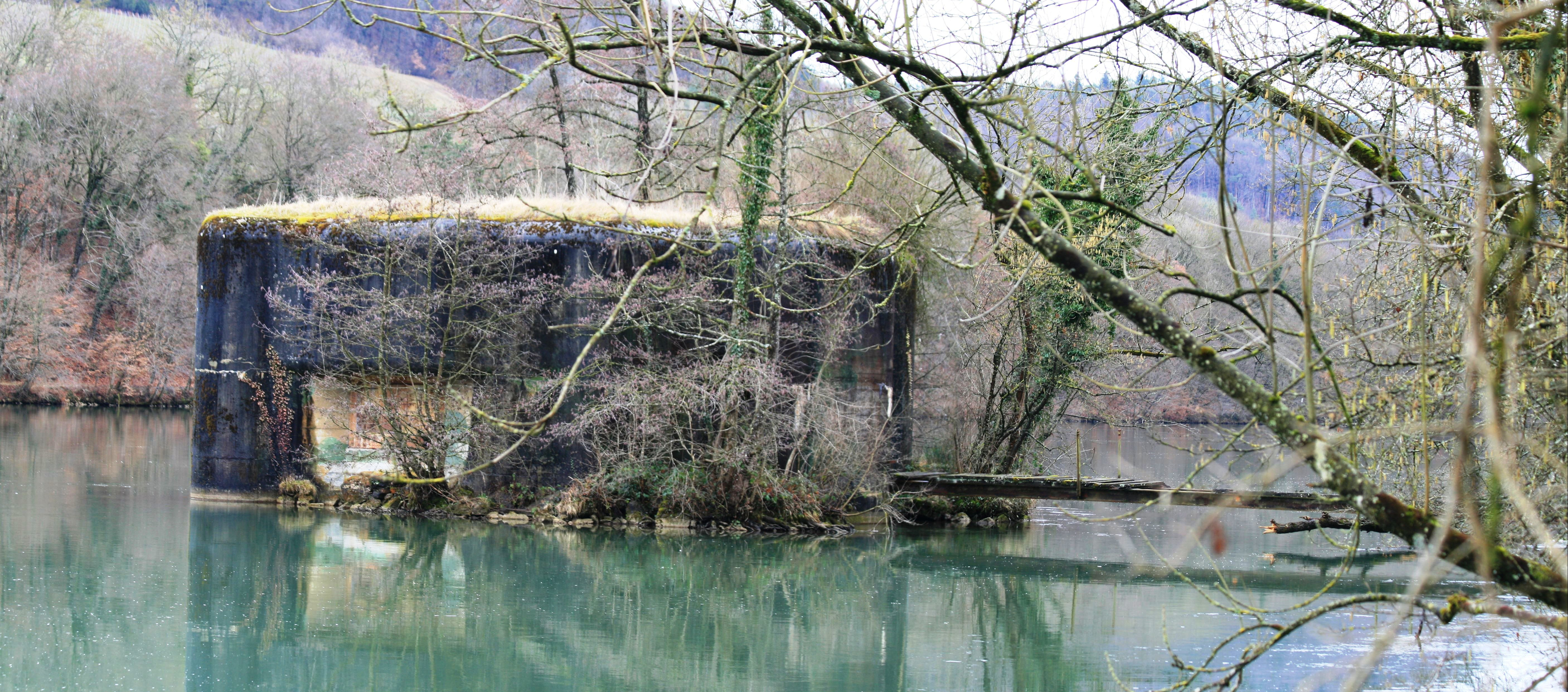 Schwarzwasserstelz